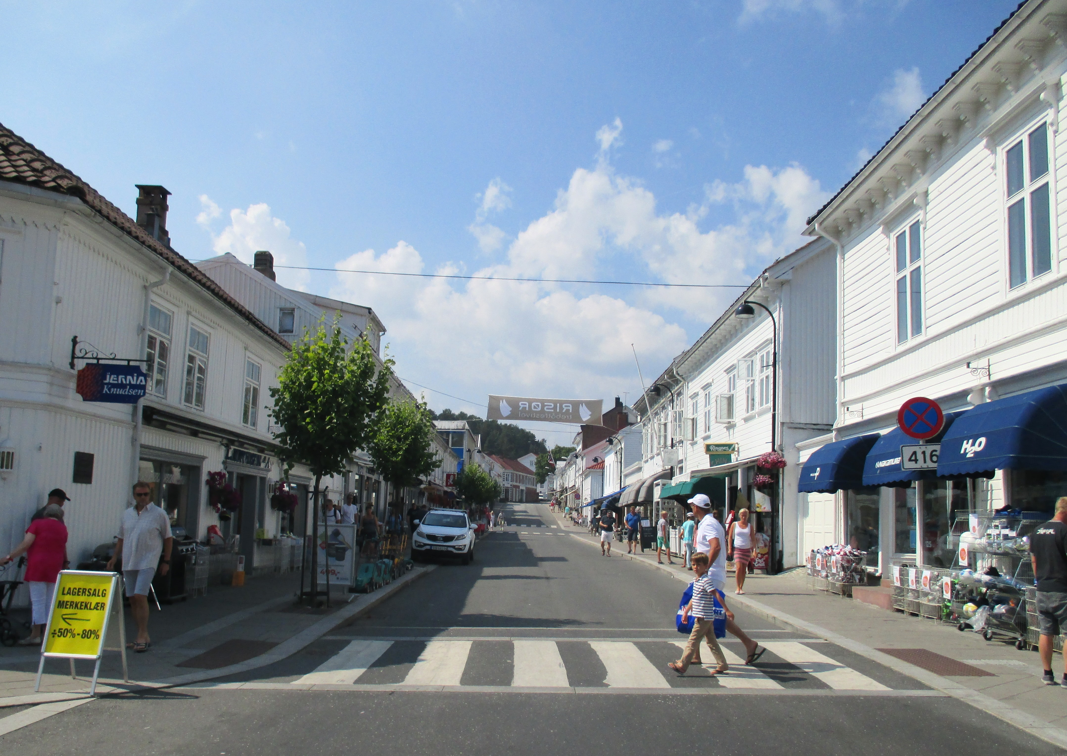 Krags gate i Risør er en del av primær fylkesvei 416.